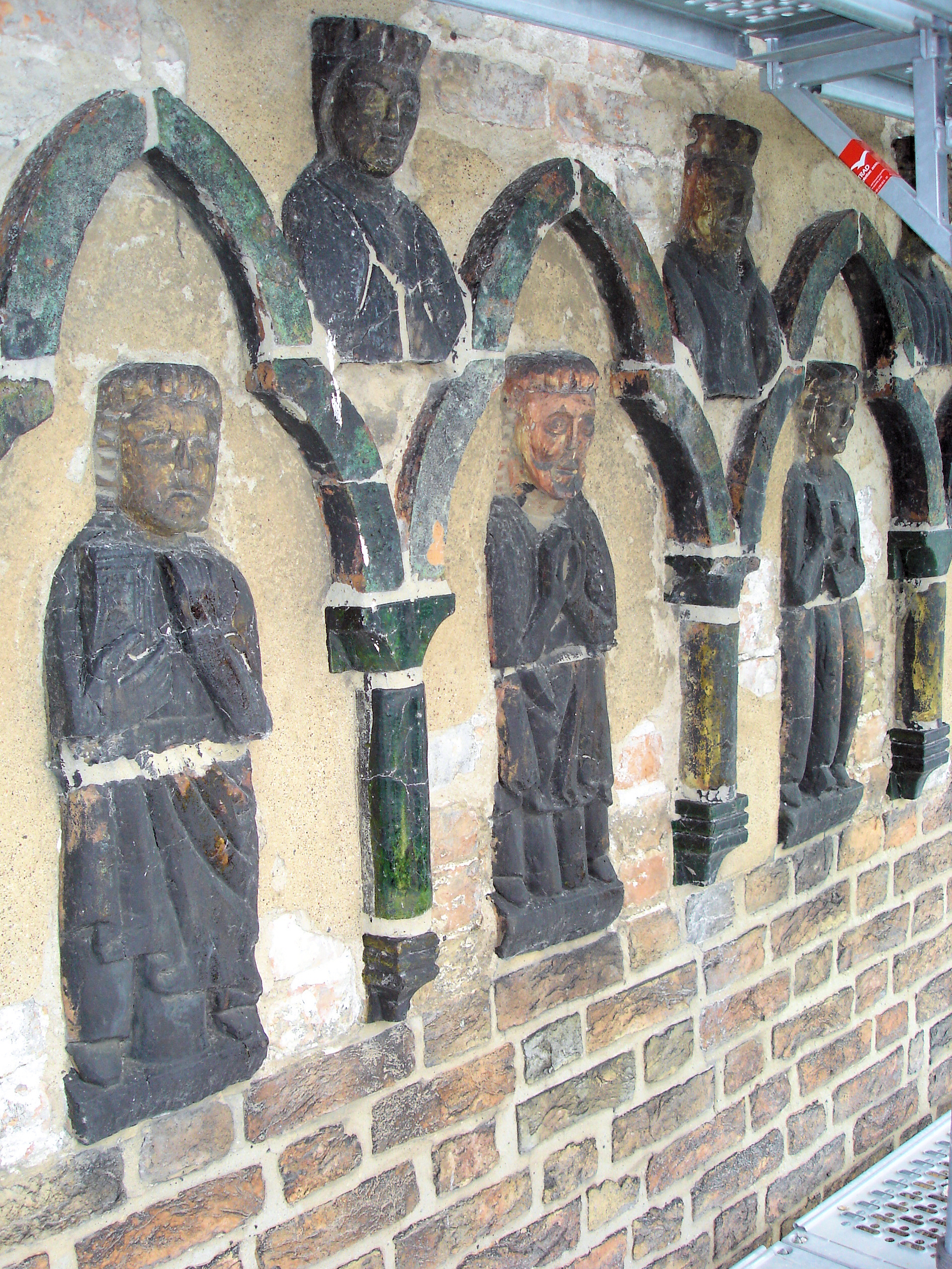 gotische Figuren unter einem Bogenfries an der Westseite des Turmes der Marienkirche in Rostock